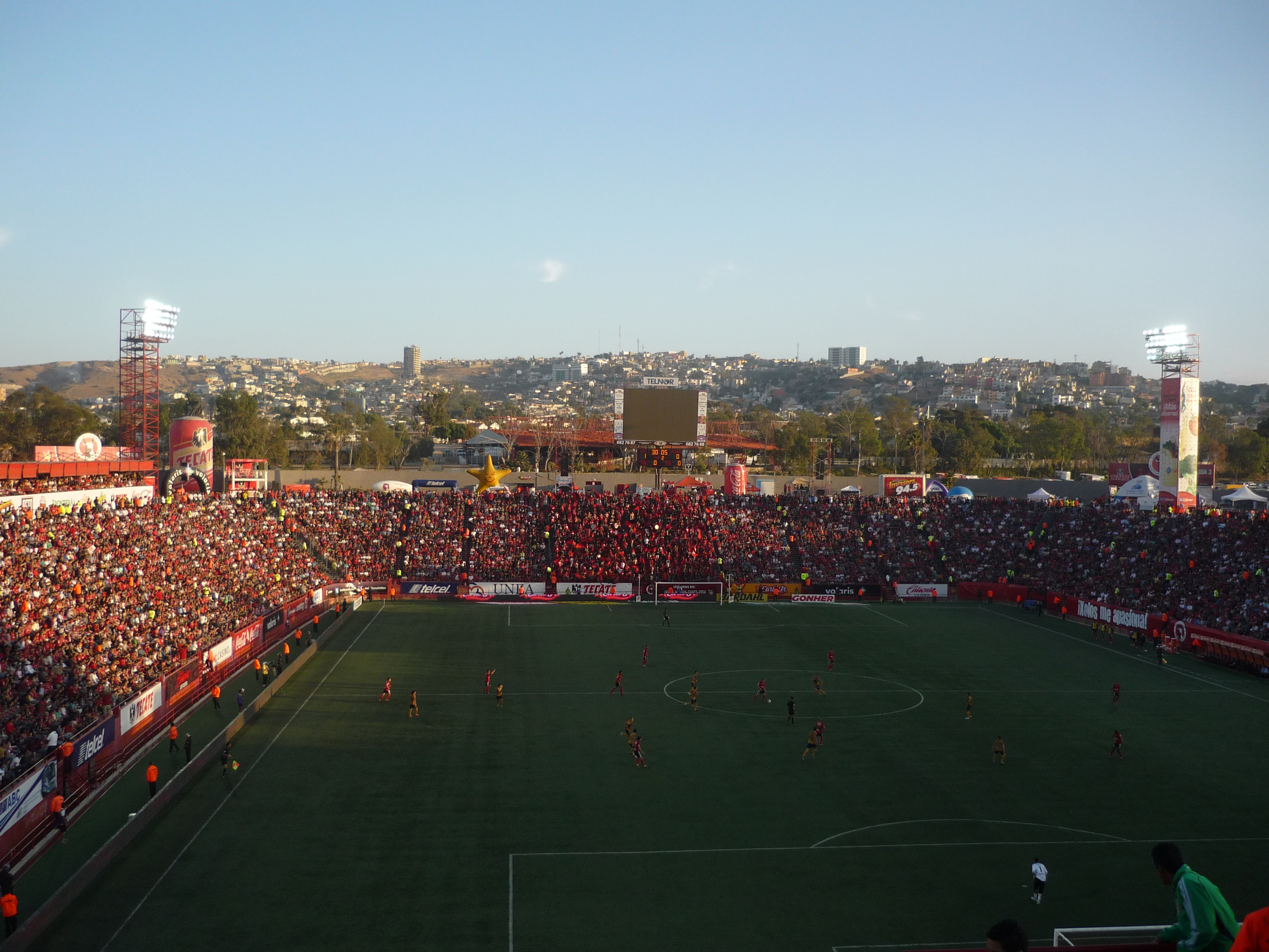 Estadio de Club Tijuana